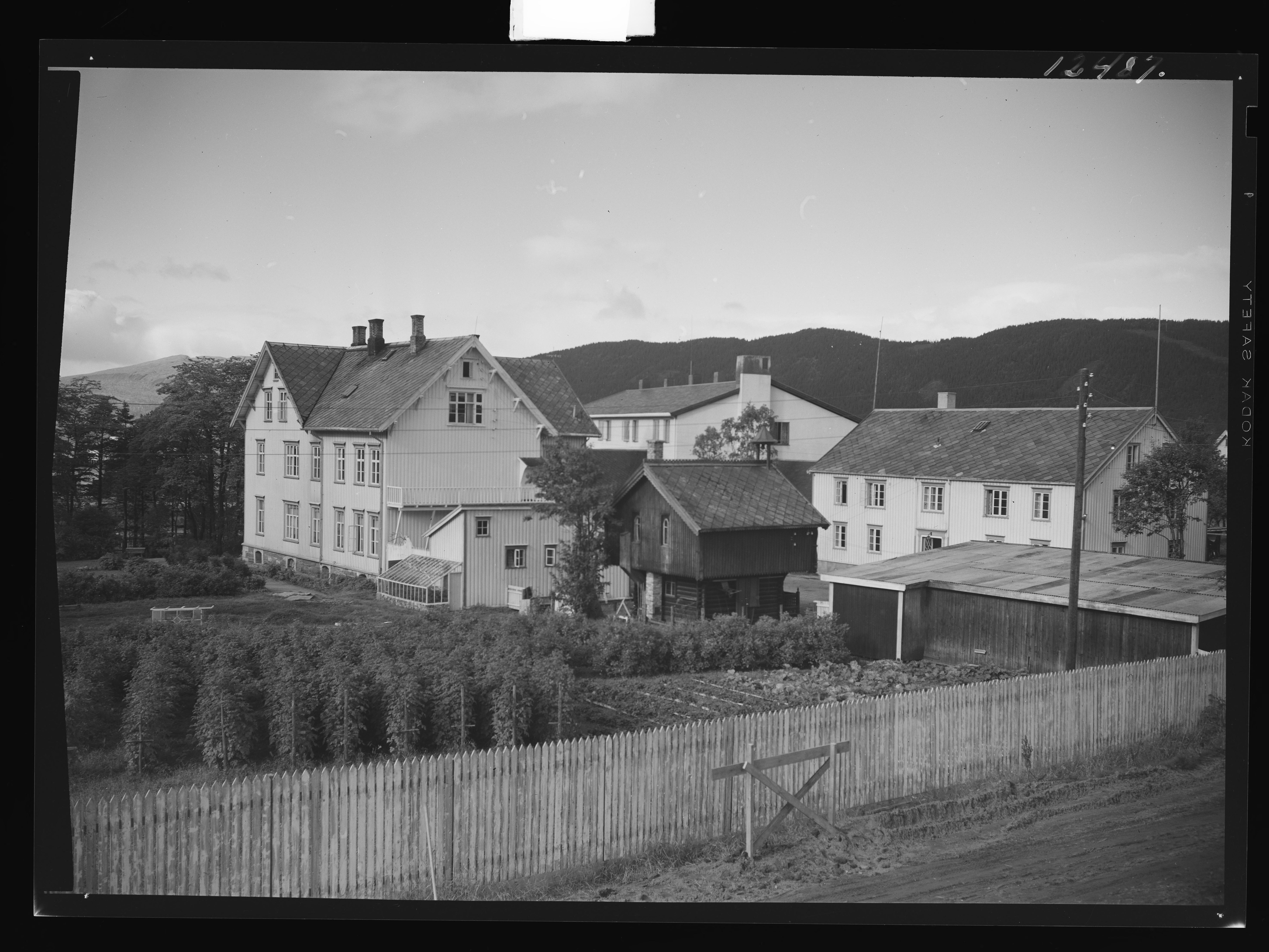 Bildet er hentet fra Nasjonalbibliotekets bildesamling. Anmerkninger til bildet var: Fotograf:Ukjent Mo i Rana, Rana, Nordland